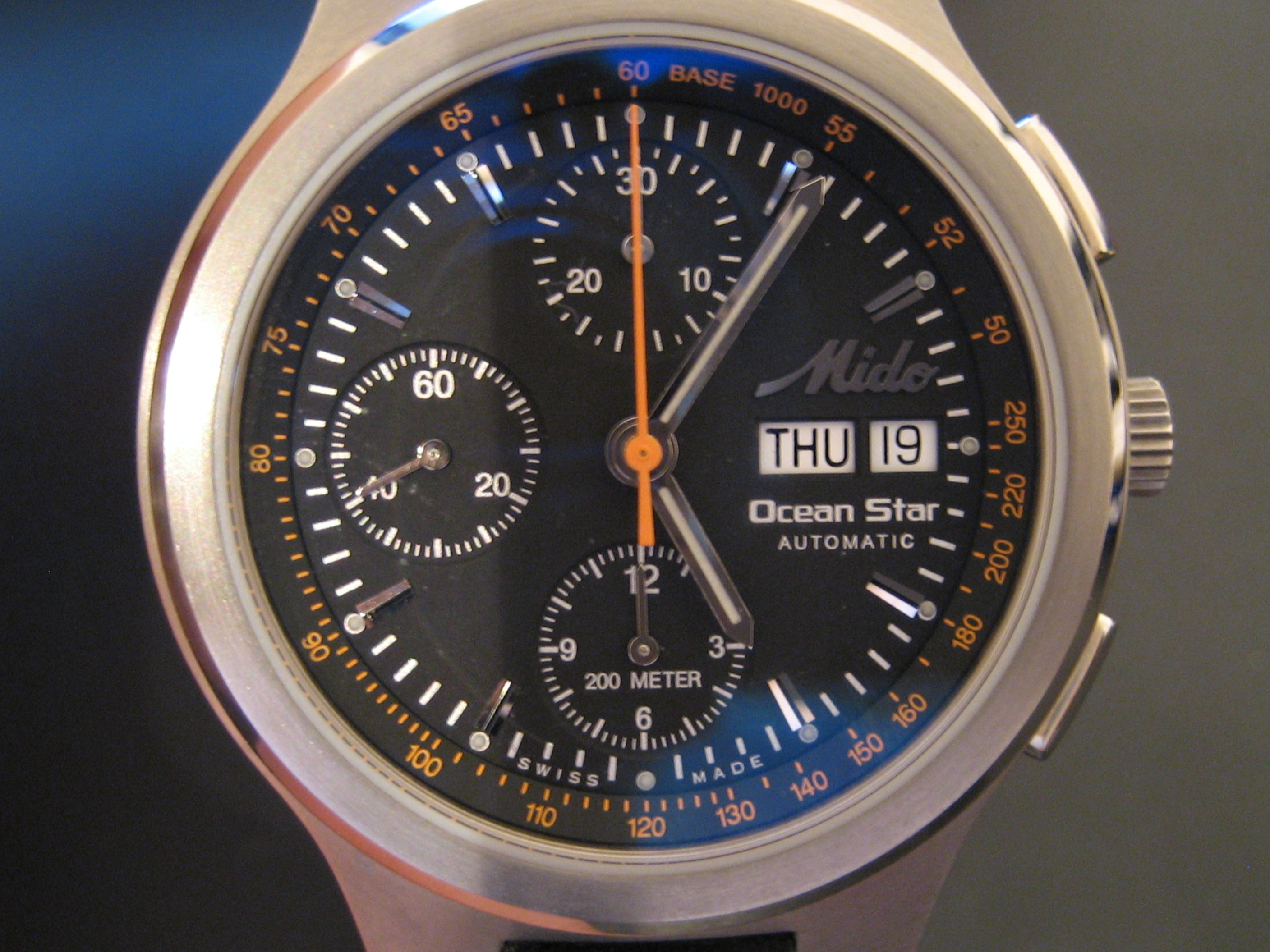 Tachymeter